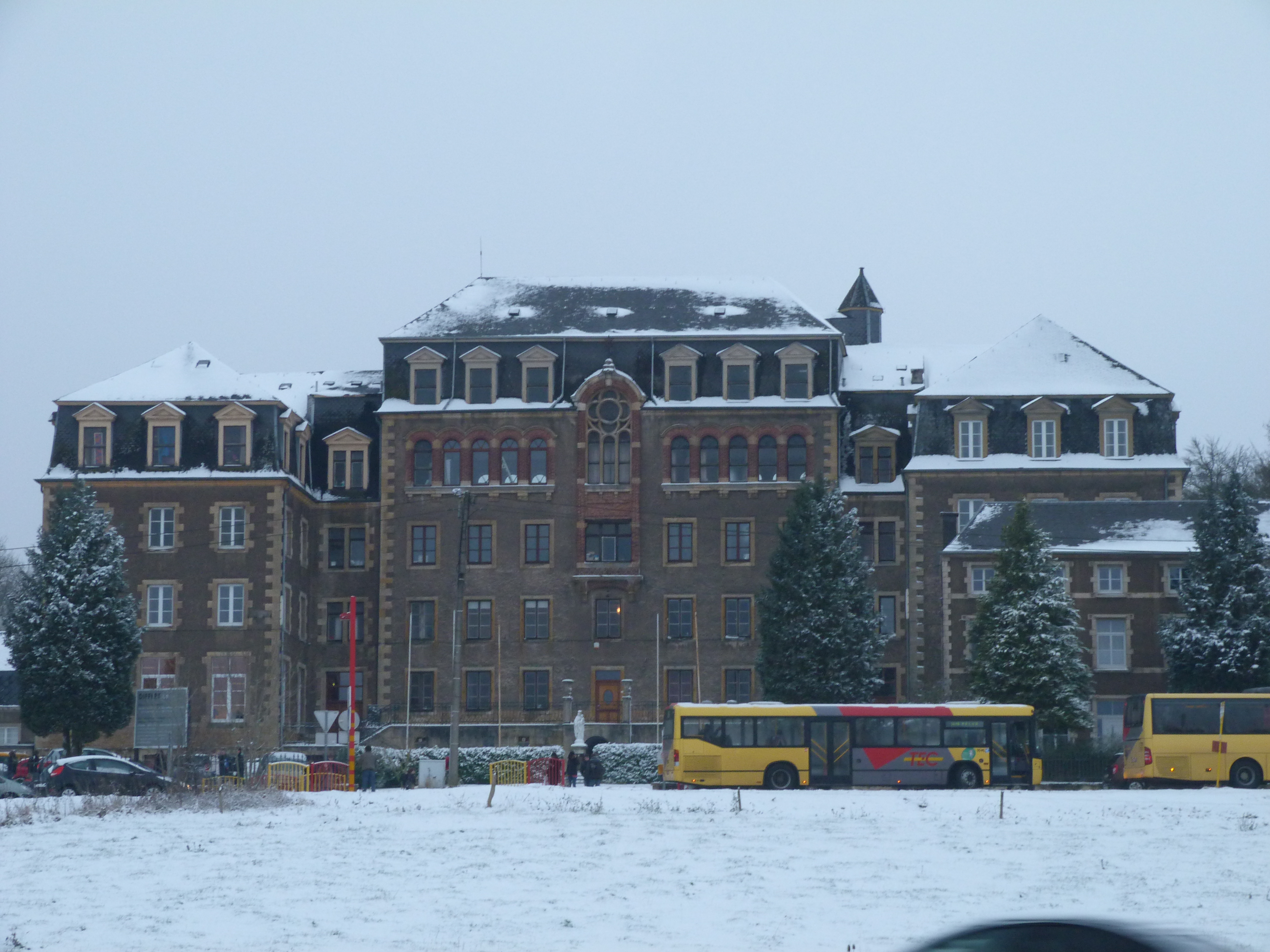 L'institut Cardijn Lorraine vu depuis la n81